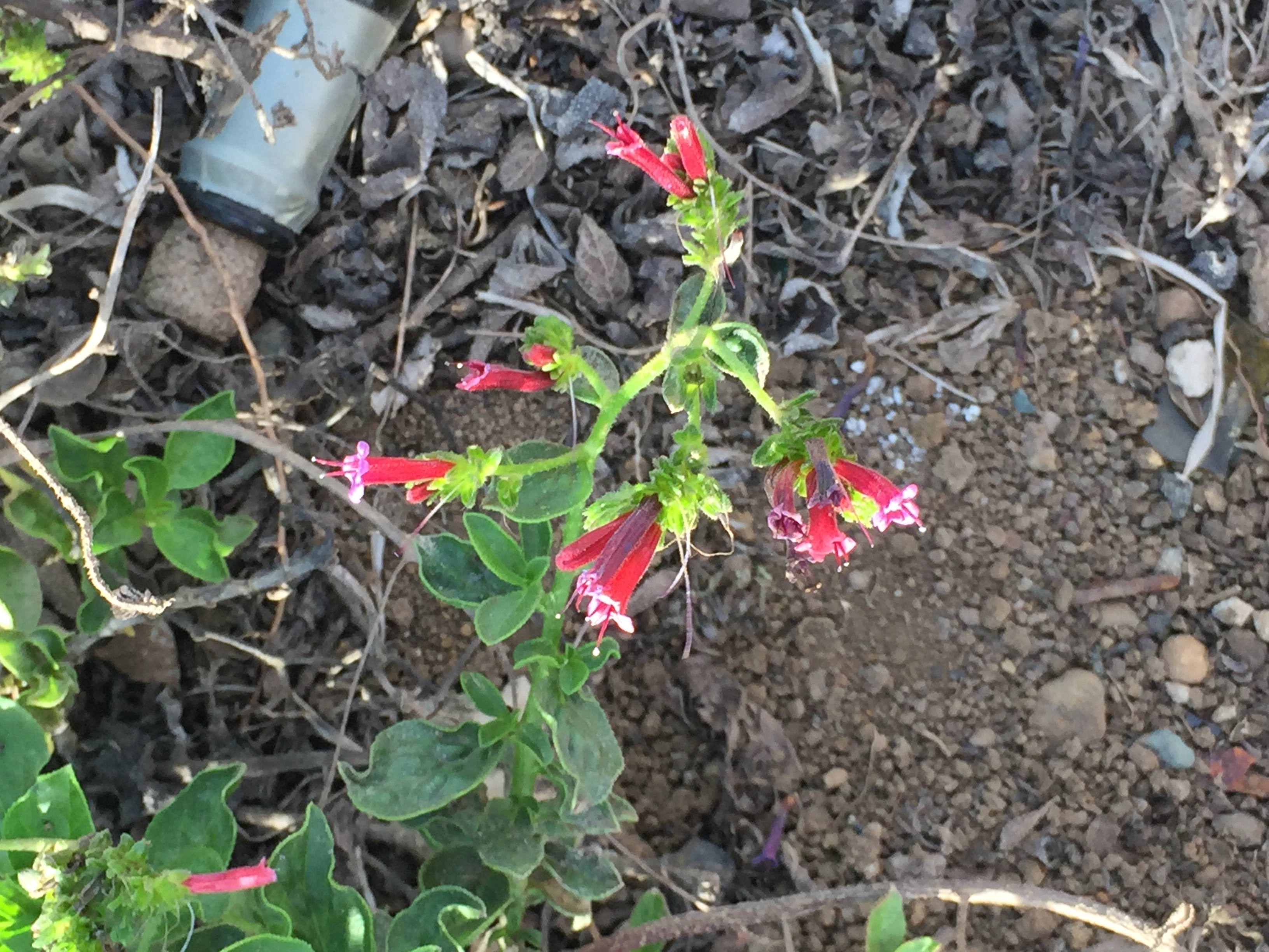 Un'esemplare di echium stenosiphon a Monte Verde.